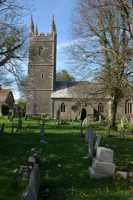 Bradworthy church